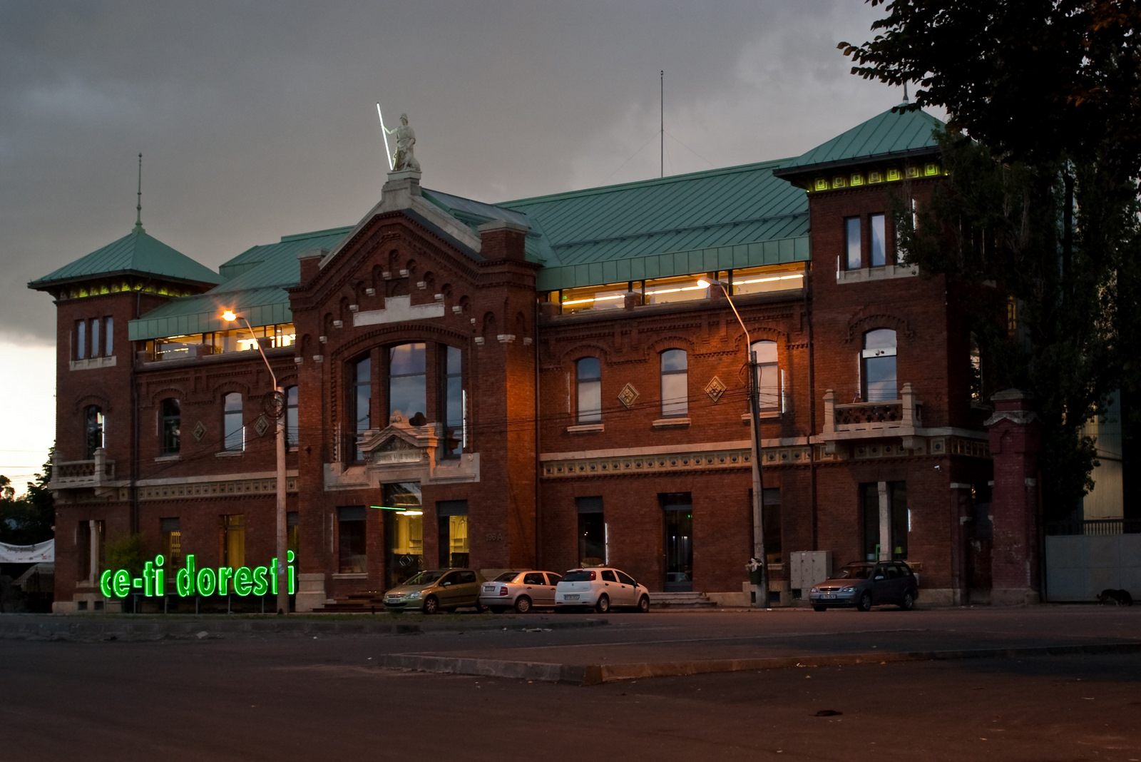 Fotografia prezinta Bursa Marfurilor, element component al Ansamblului Antrepozitelor din Bucuresti.